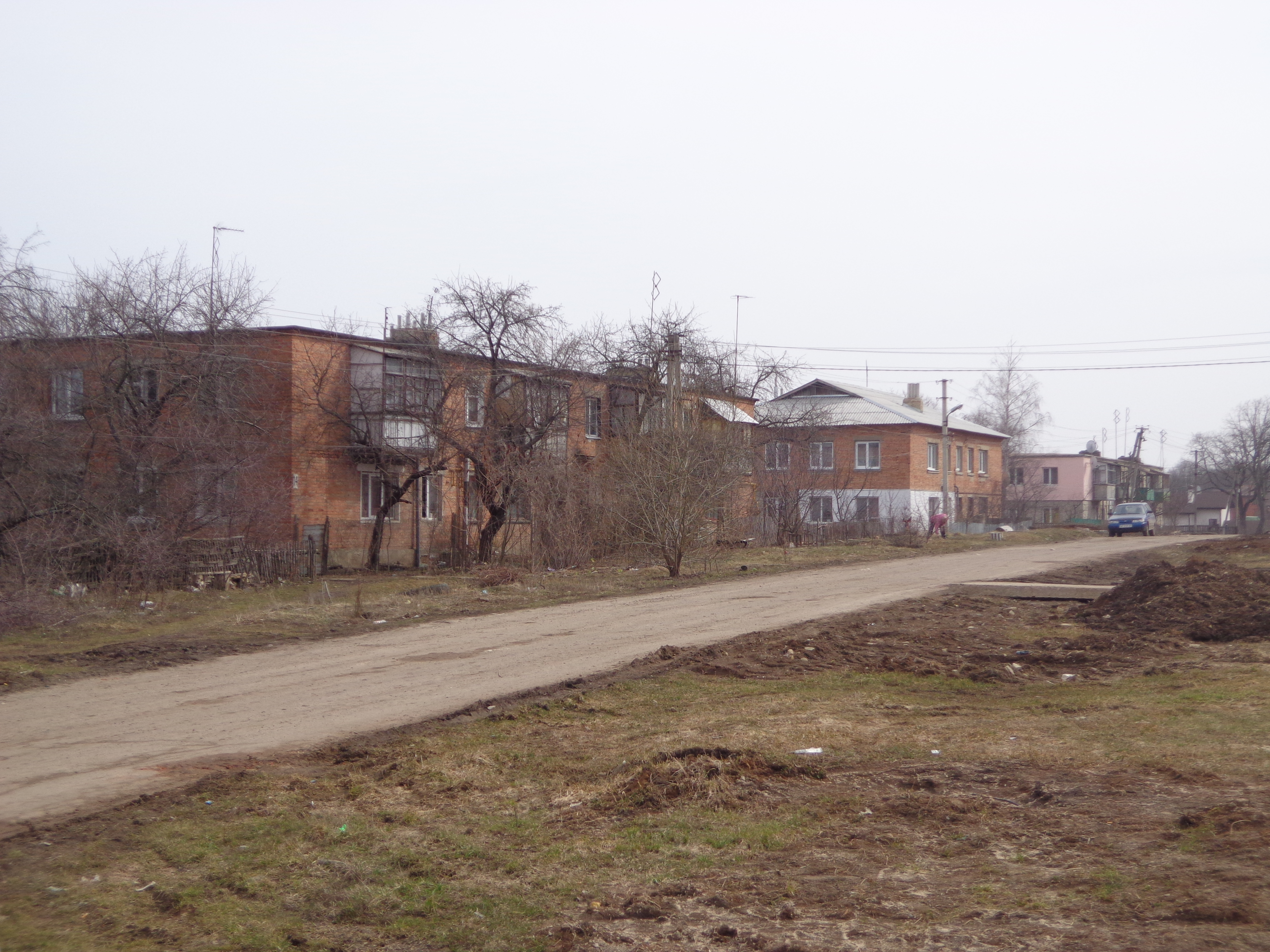 Центральная улица пос. Лесное, Дергачёвский р-н, Харьковская обл.